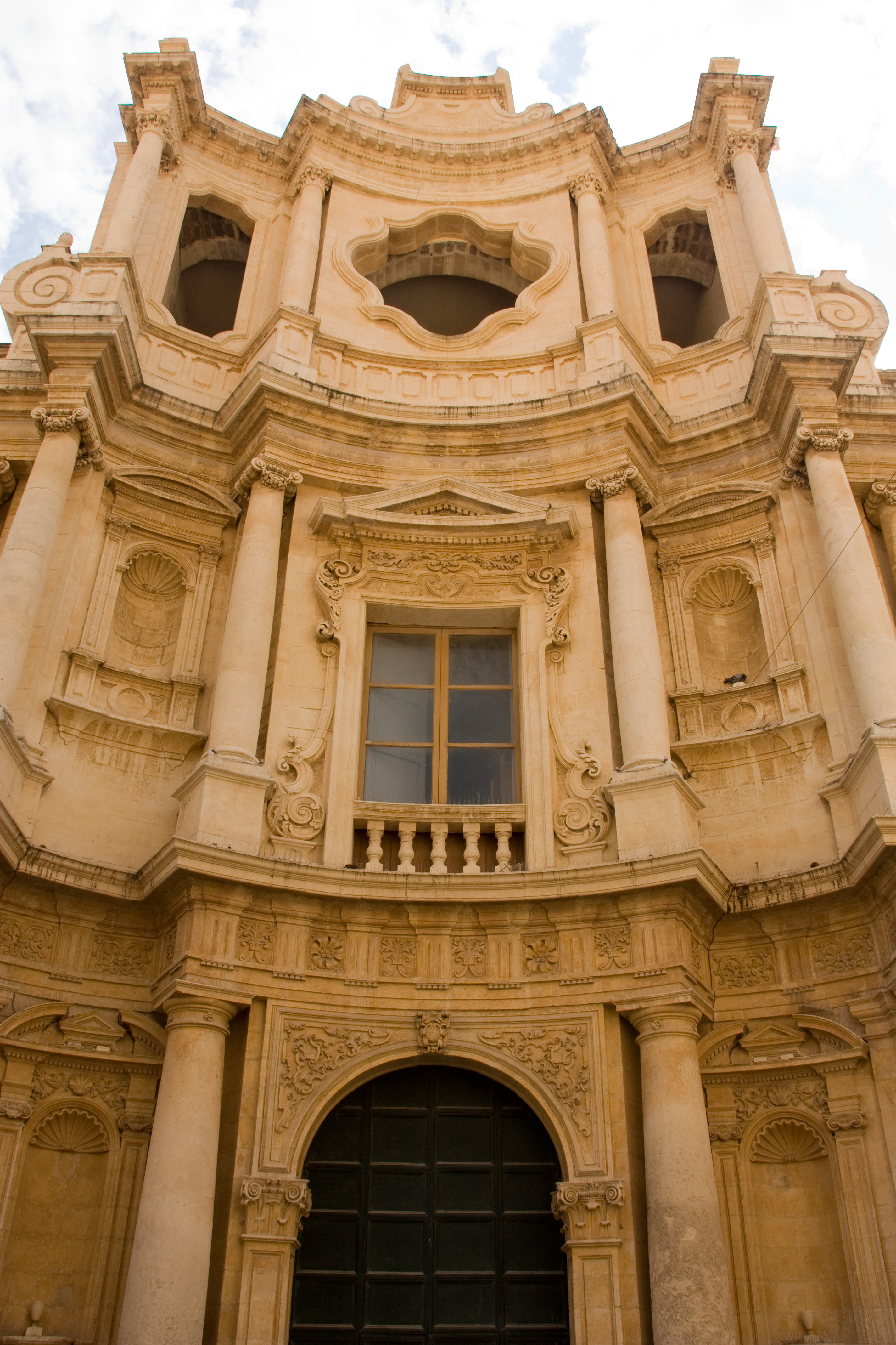 Chiesa di San Carlo Borromeo, Noto, Sicile, Italie.